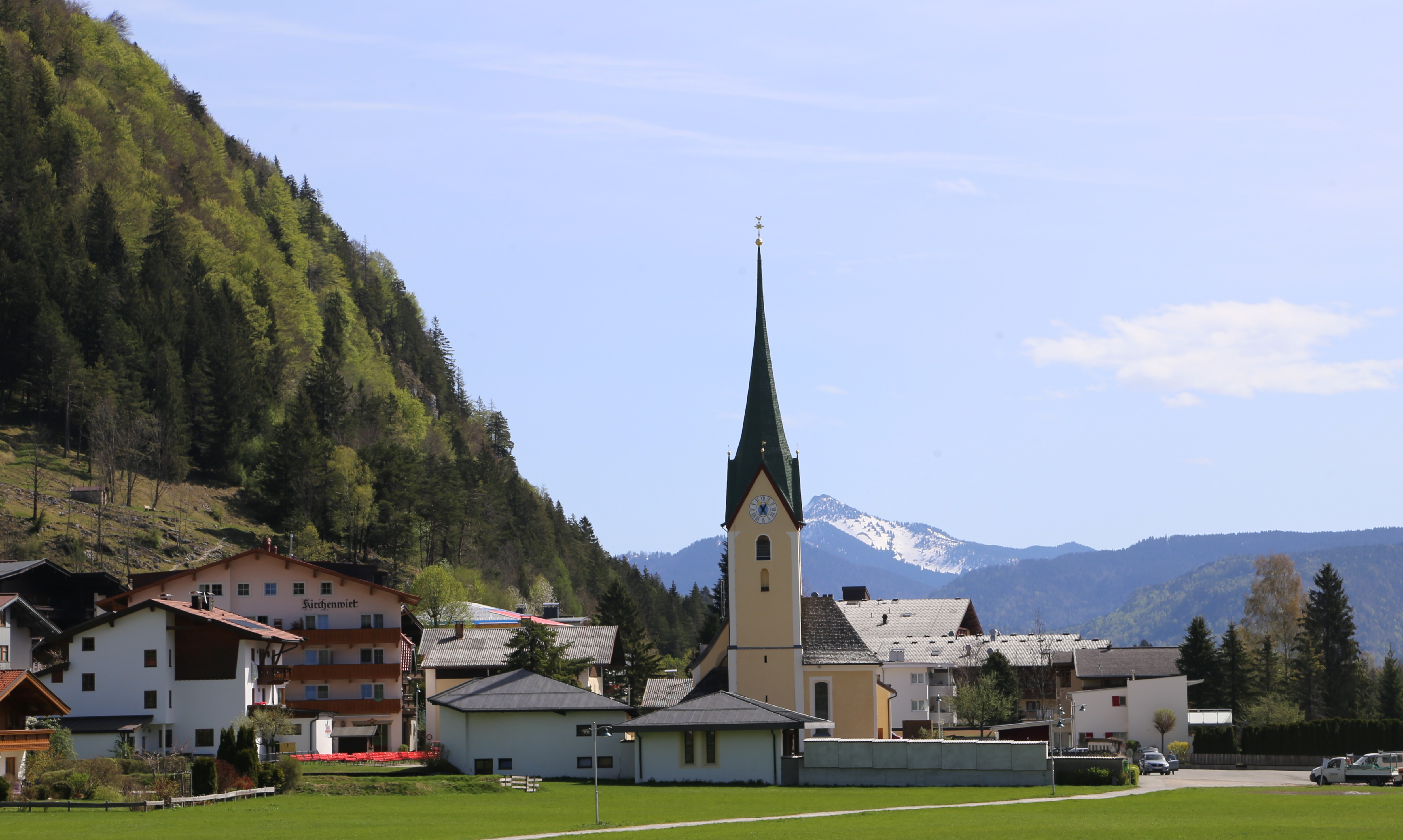 Pfarrkirche Sankt Johannes der Täufer, Walchsee This media shows the remarkable cultural object in the Austrian state of Tyrol listed by the Tyrolean Art Cadastre with the ID 2356. (on tirisMaps, pdf, more images on Commons)